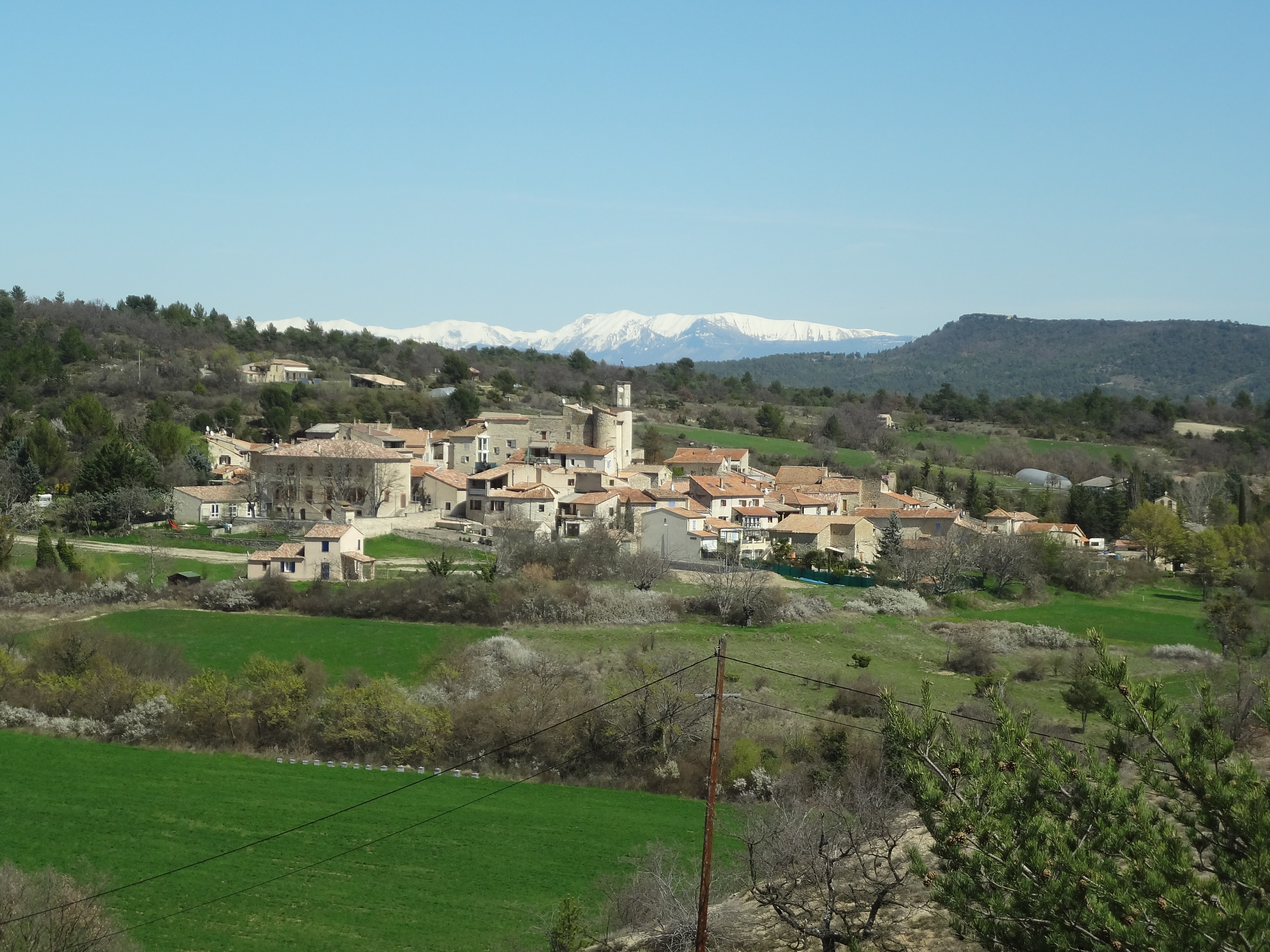 Le village de Sigonce (photo prise de l’ouest, colline de Chantebelle)